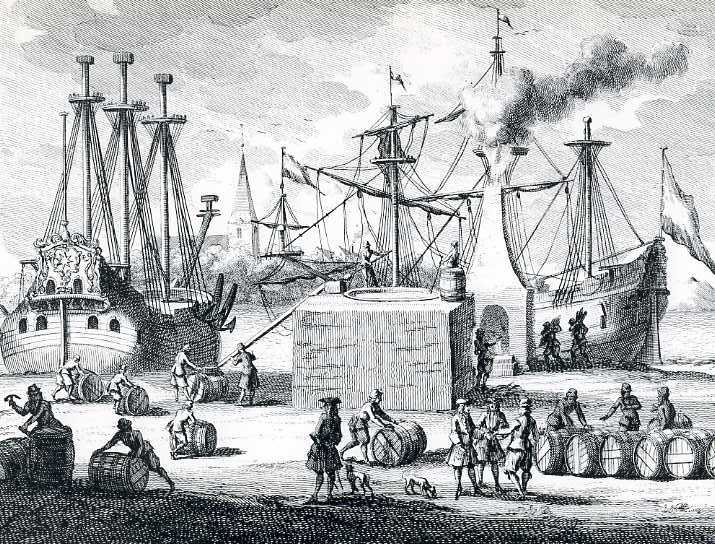 Kupferstich: Adolf van der Laan (ca. 1690 - 1742)